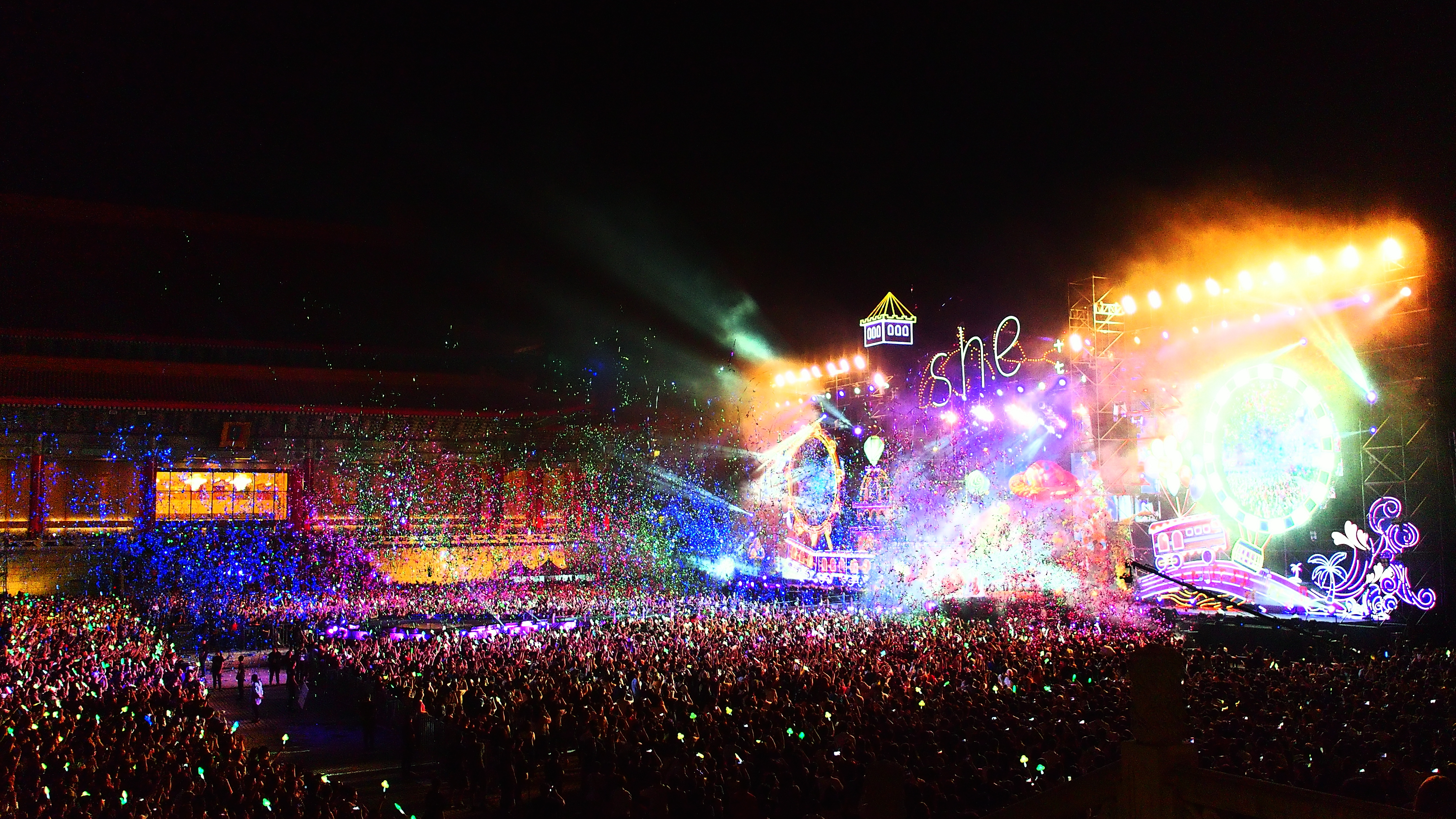 S.H.E十七音樂會